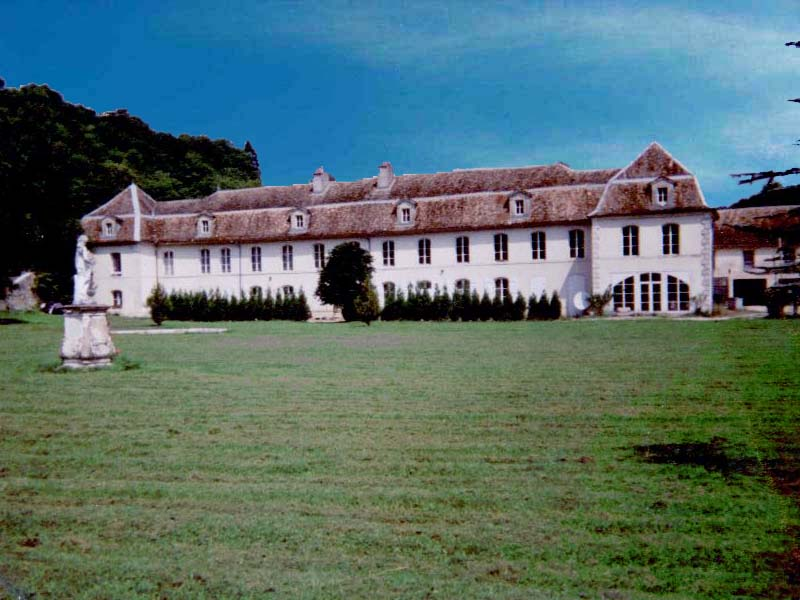 Abbaye Notre-Dame de L'Étanche (Vosges). À ne pas confondre avec l'autre Abbaye Notre-Dame de L'Étanche (Meuse).